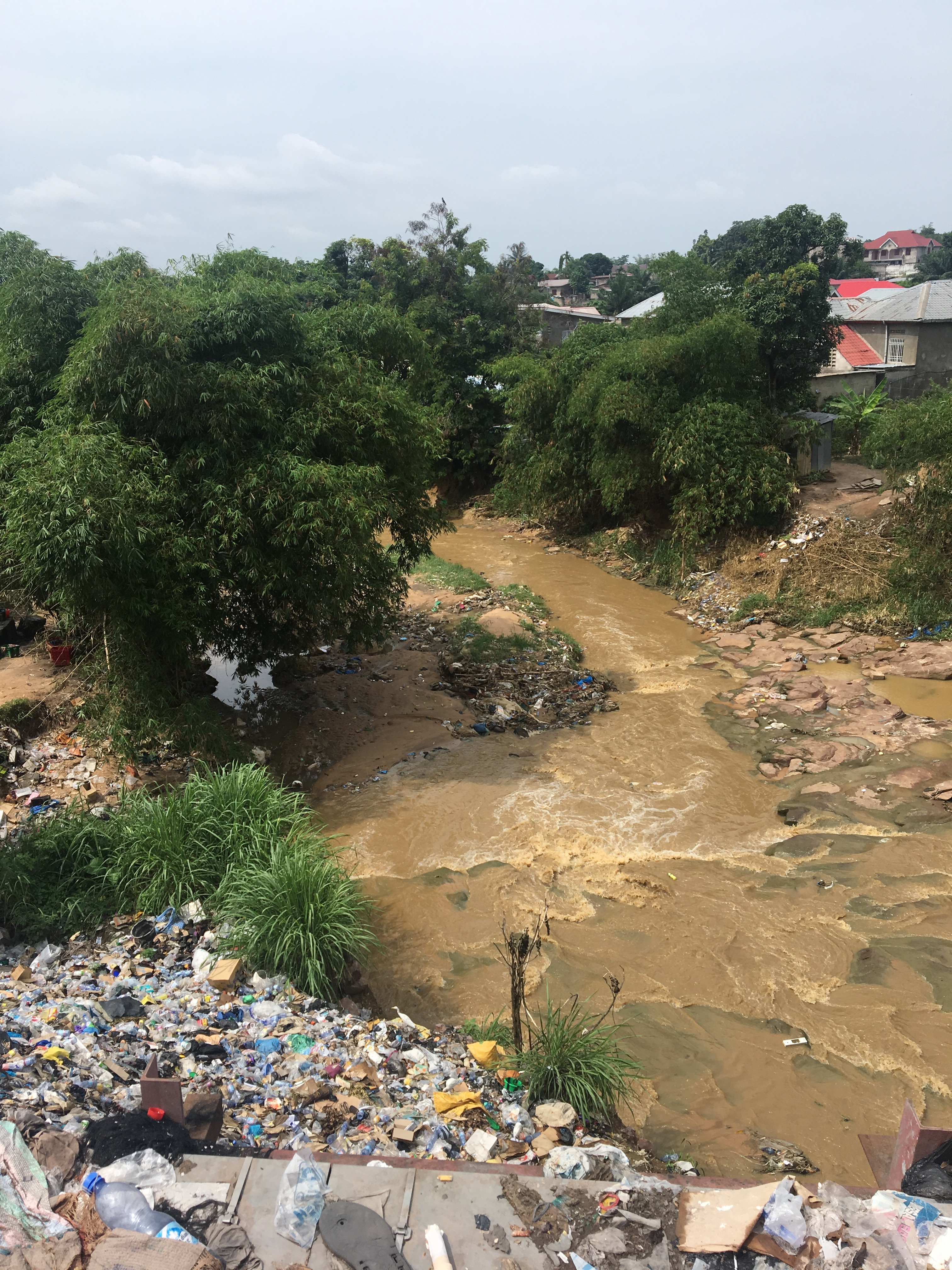 Pont de Kinsuka, pollution